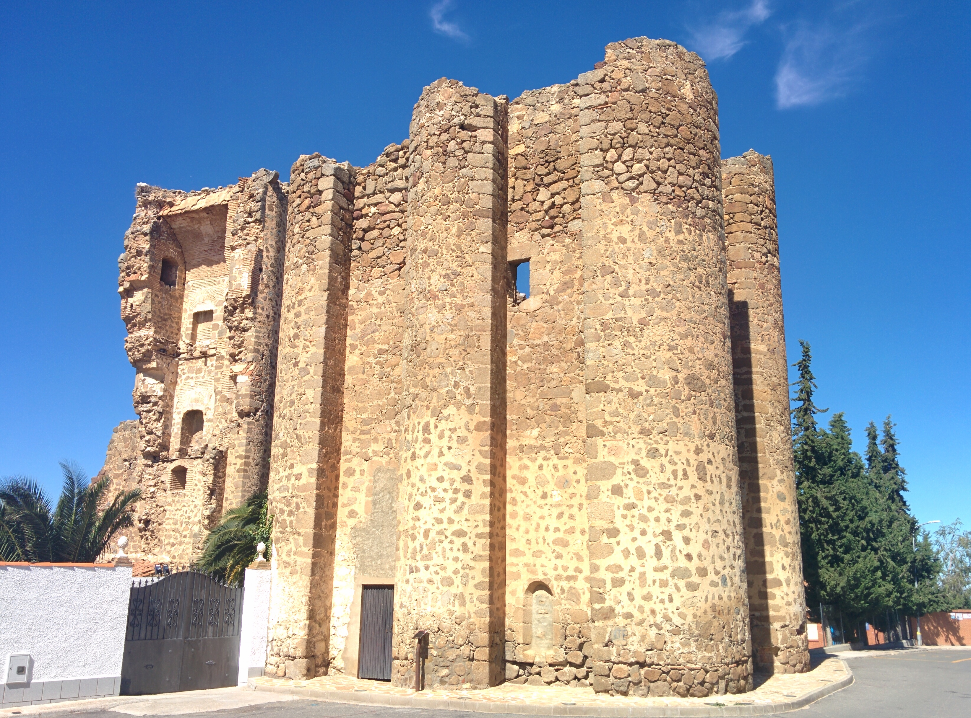 Castillo de Polán (Toledo, España).